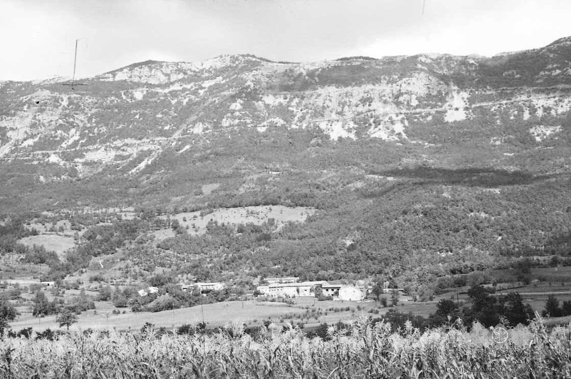 Pogled na Podgrič.